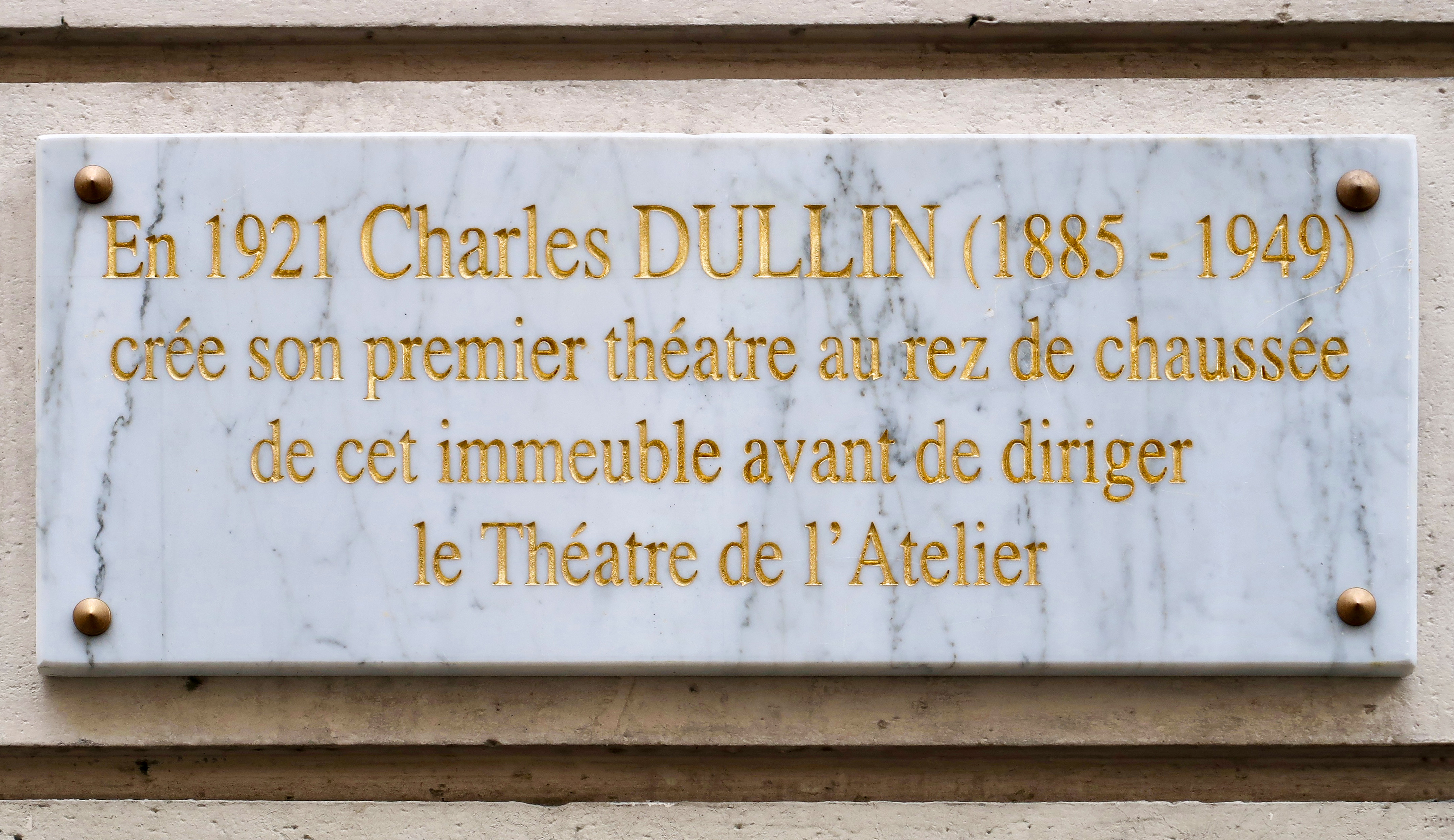 Plaque en hommage à Charles Dullin, 7 rue Honoré-Chevalier (Paris, 6e).